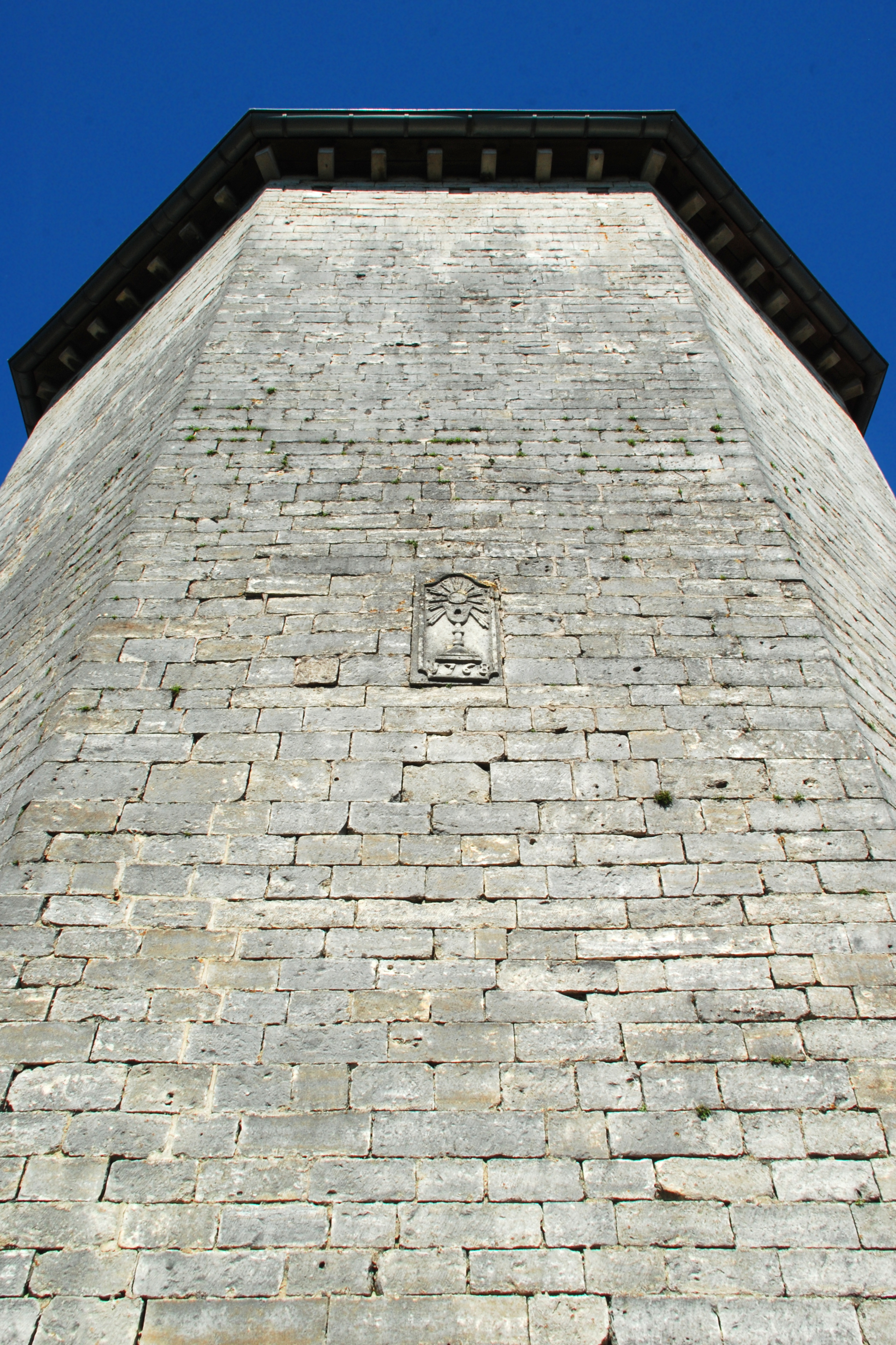 Belgique - Brabant wallon - Jodoigne - Saint-Remy-Geest - Église Saint-Remy